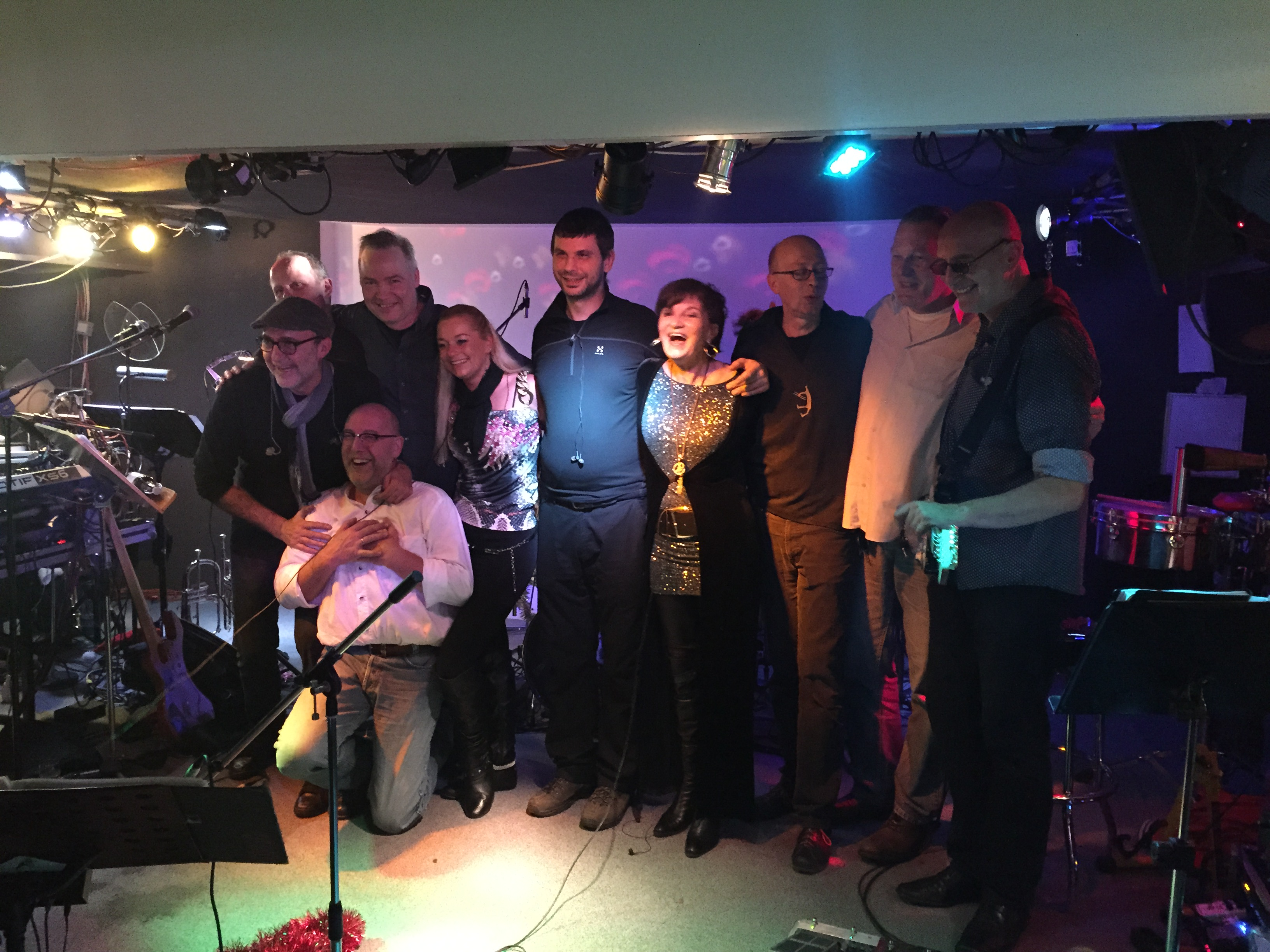 Fritz Brause nach einem kleinen Weihnachtskonzert am 22.12.2014 in ihrem Bunker in Bochum.